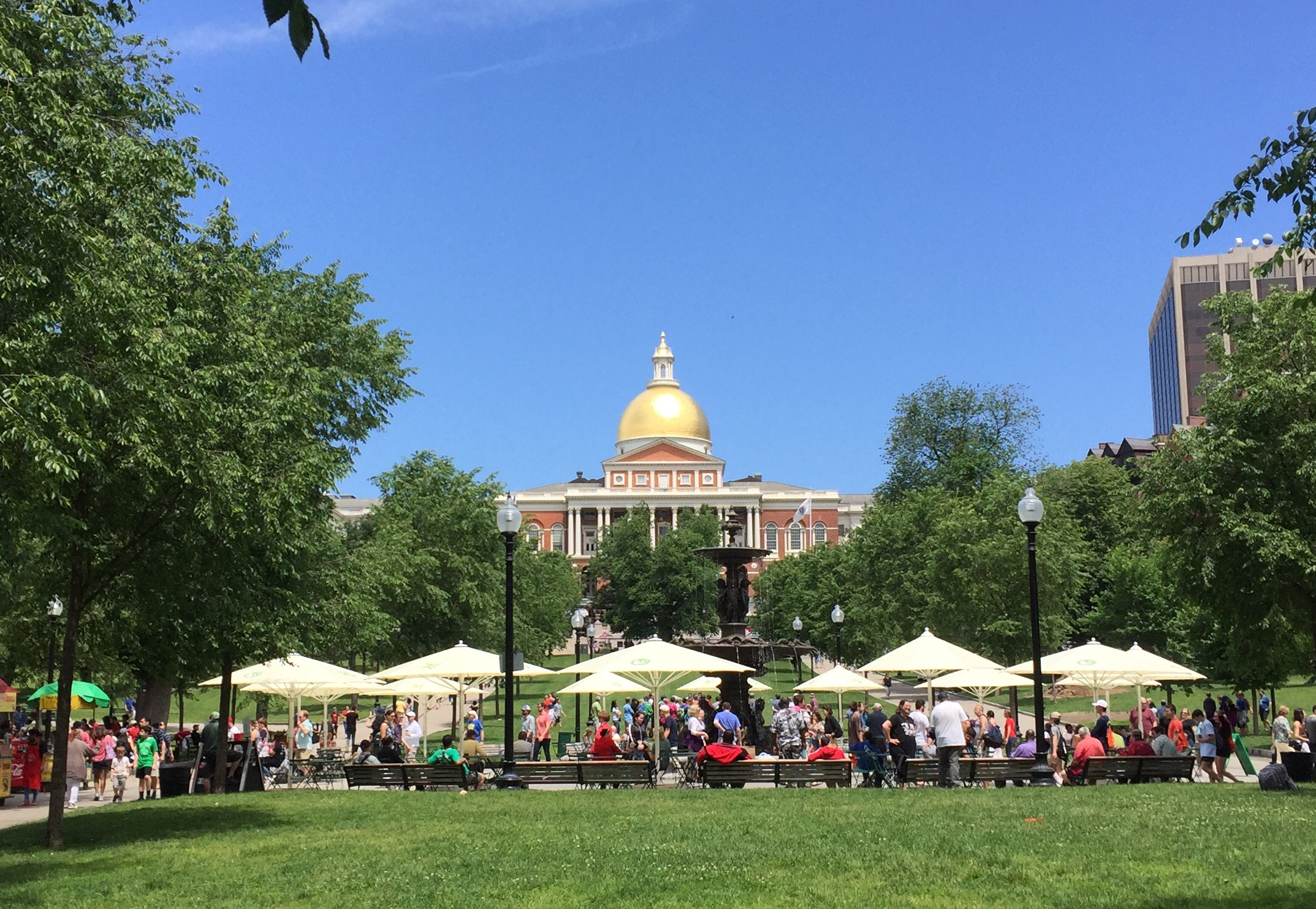 Casa l'Estáu dende'l Boston Common.